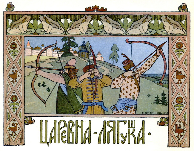 Заставка к сказке "Царевна-лягушка"